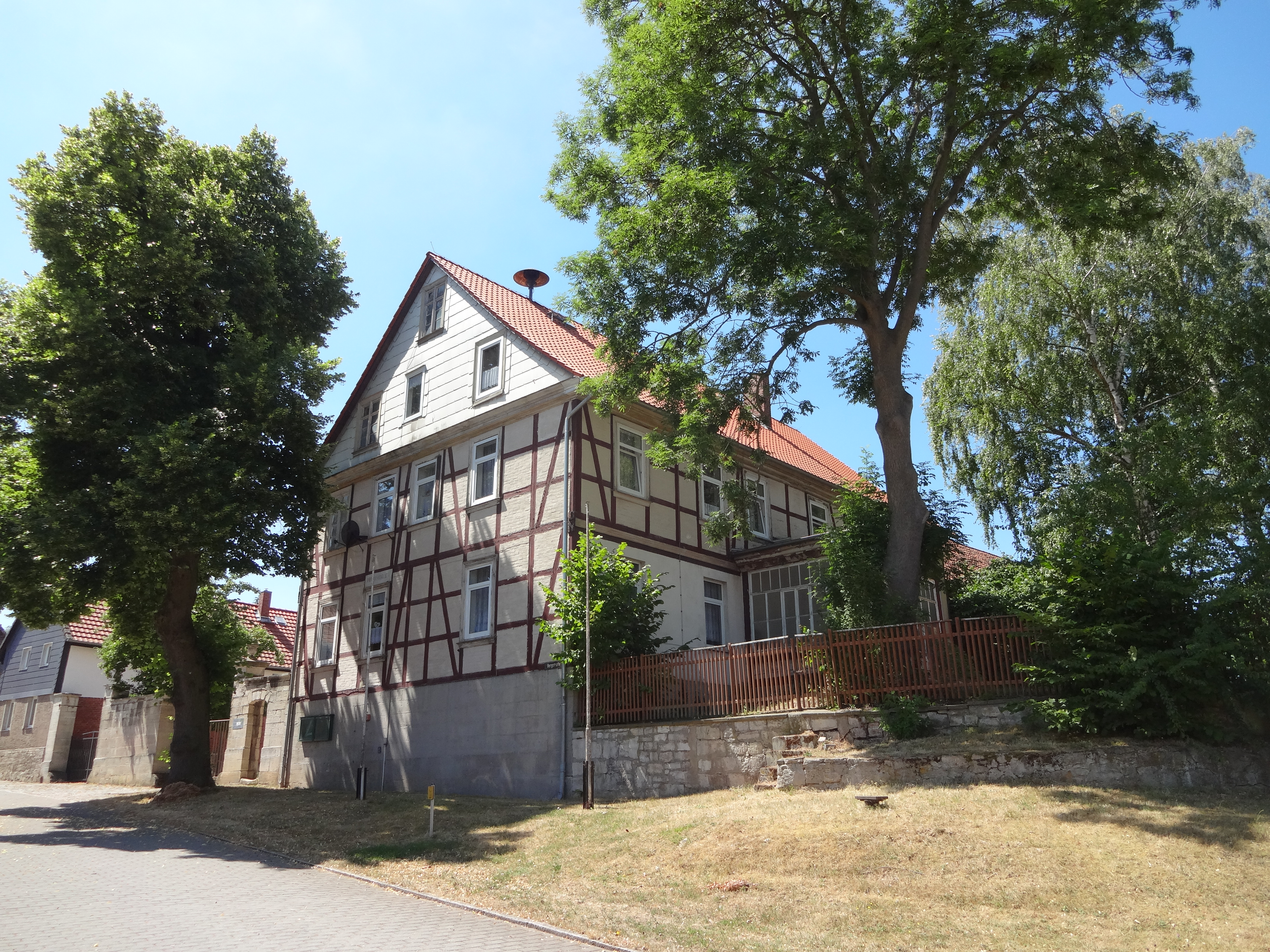 Denkmalgeschütztes Bauernhaus in Bergstraße 103 in Vogelsdorf (Gemeinde Huy)